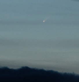 Comet McNaught (C/2006 P1) on Jan/7/2007 at 16:27UTC taken in Schaffhausen/Switzerland. Photographer: Mark Vornhusen